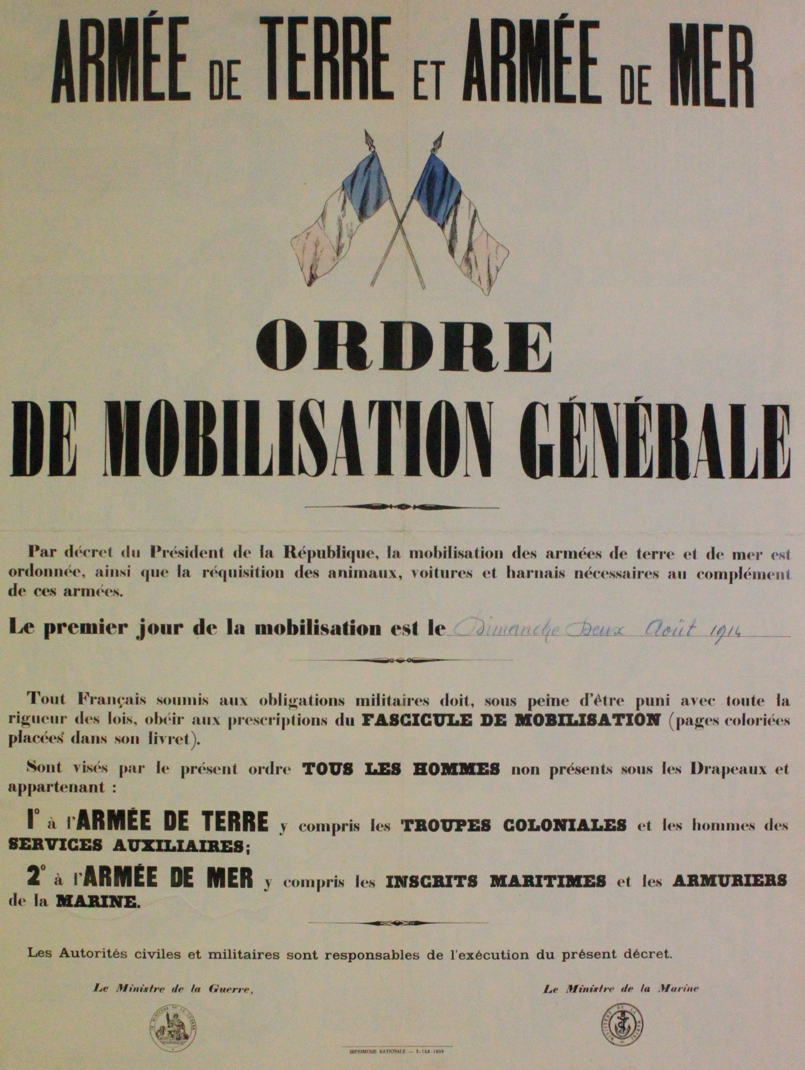 Armée de Terre et Armée de Mer.Ordre de Mobilisation générale.